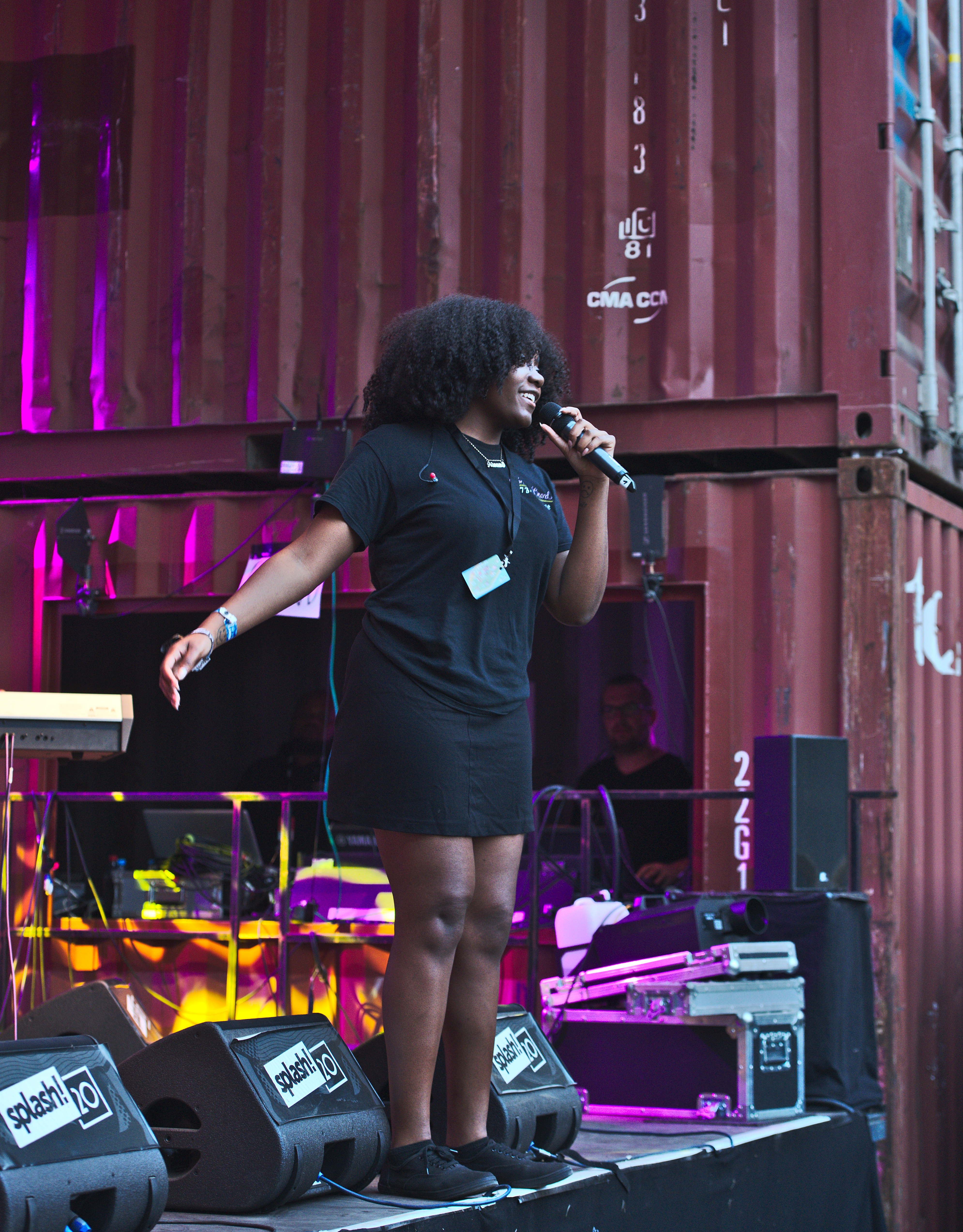 Die US-amerikanische Rapperin Noname beim splash! Festival 20 (2017).